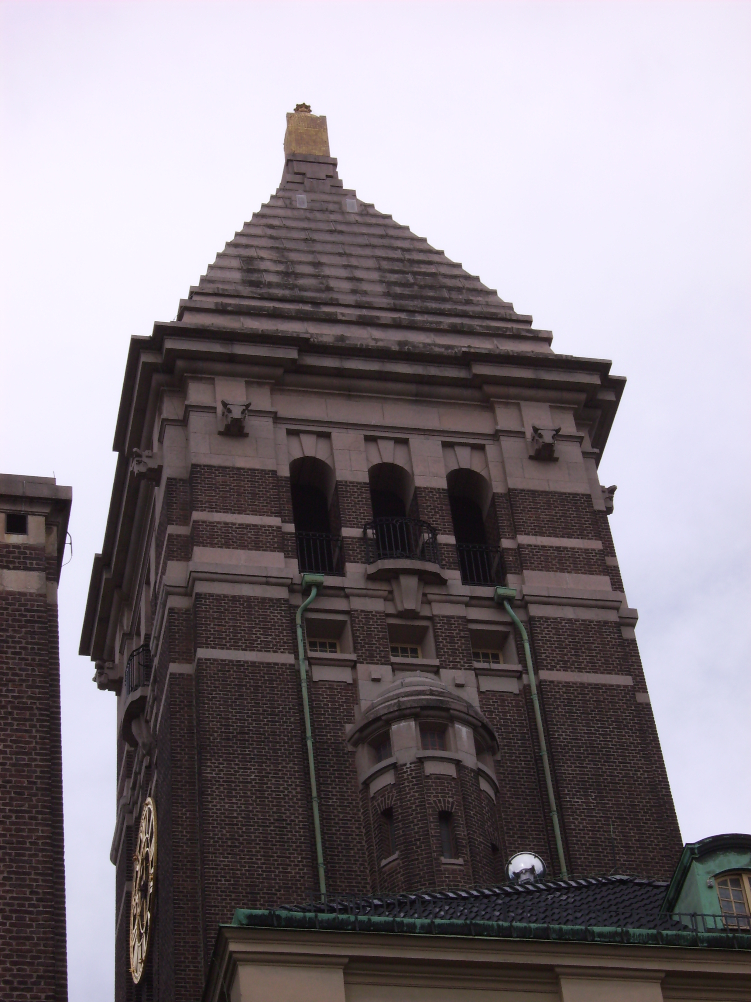 Bilden är fotograferad av Harri Blomberg. Photo by Harri Blomberg.